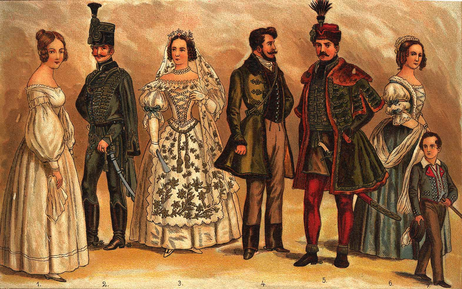 Magyar viselet 1825–1849.